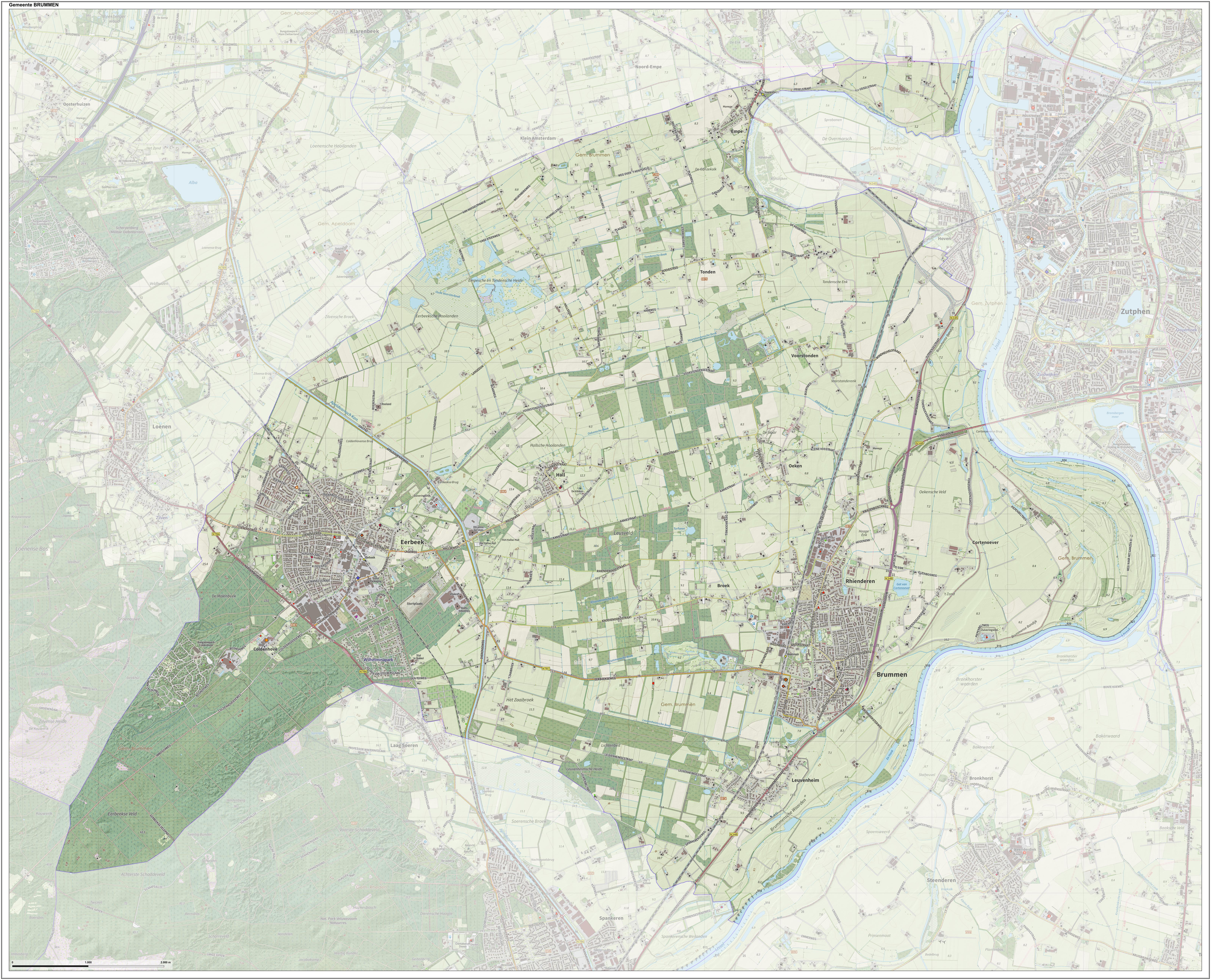 Topografische gemeentekaart. Resolutie: 400 pixels/km. Kaartbeeld samengesteld uit de open geodata van de Top10NL en Top25namen (Kadaster), Creative Commons-BY licentie. Gebouwvlakken uit open geodata BAG extract. Wegen uit de OpenStreetMap, OpenStreetMap community. Reliëfschaduw uit de Actuele Hoogtekaart AHN2. Samenstelling en kleurenschema: Jan-Willem van Aalst, met QGIS. Zie ook de Legenda.